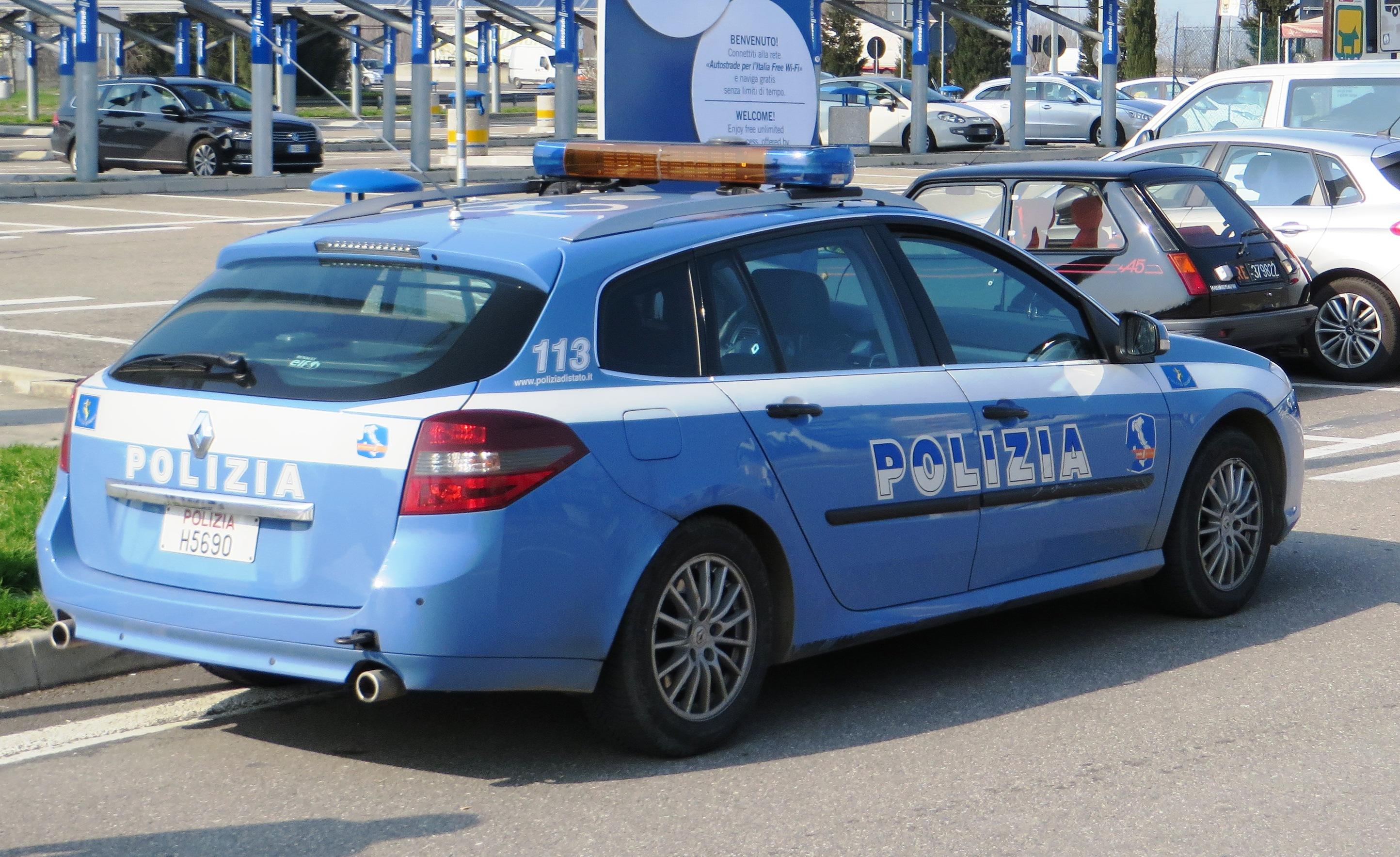 Italiaanse politie auto